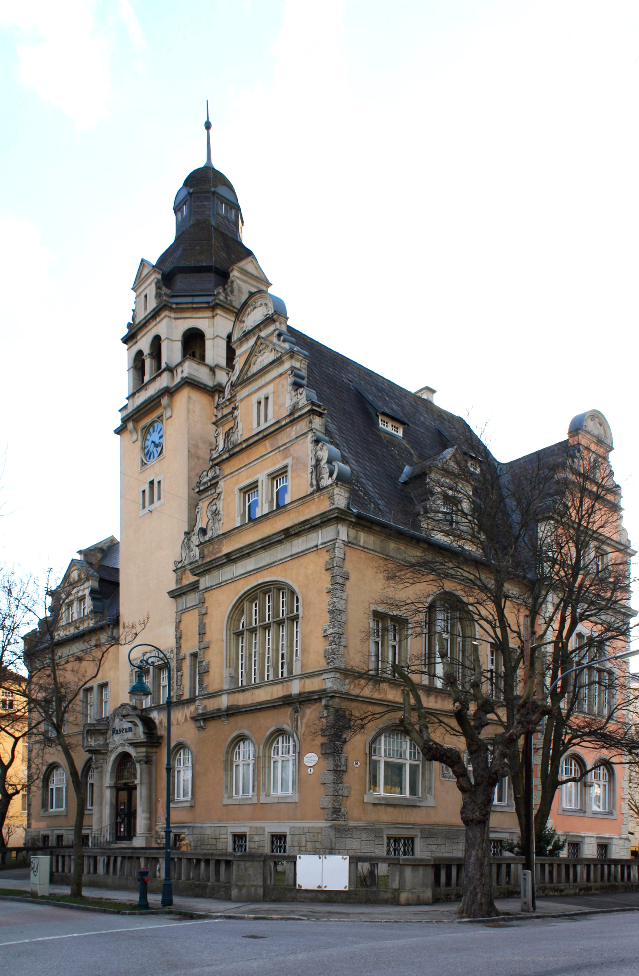 Rollettmuseum in Baden bei Wien